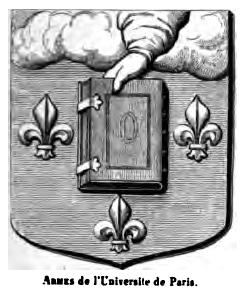 Blason de l'Université de Paris